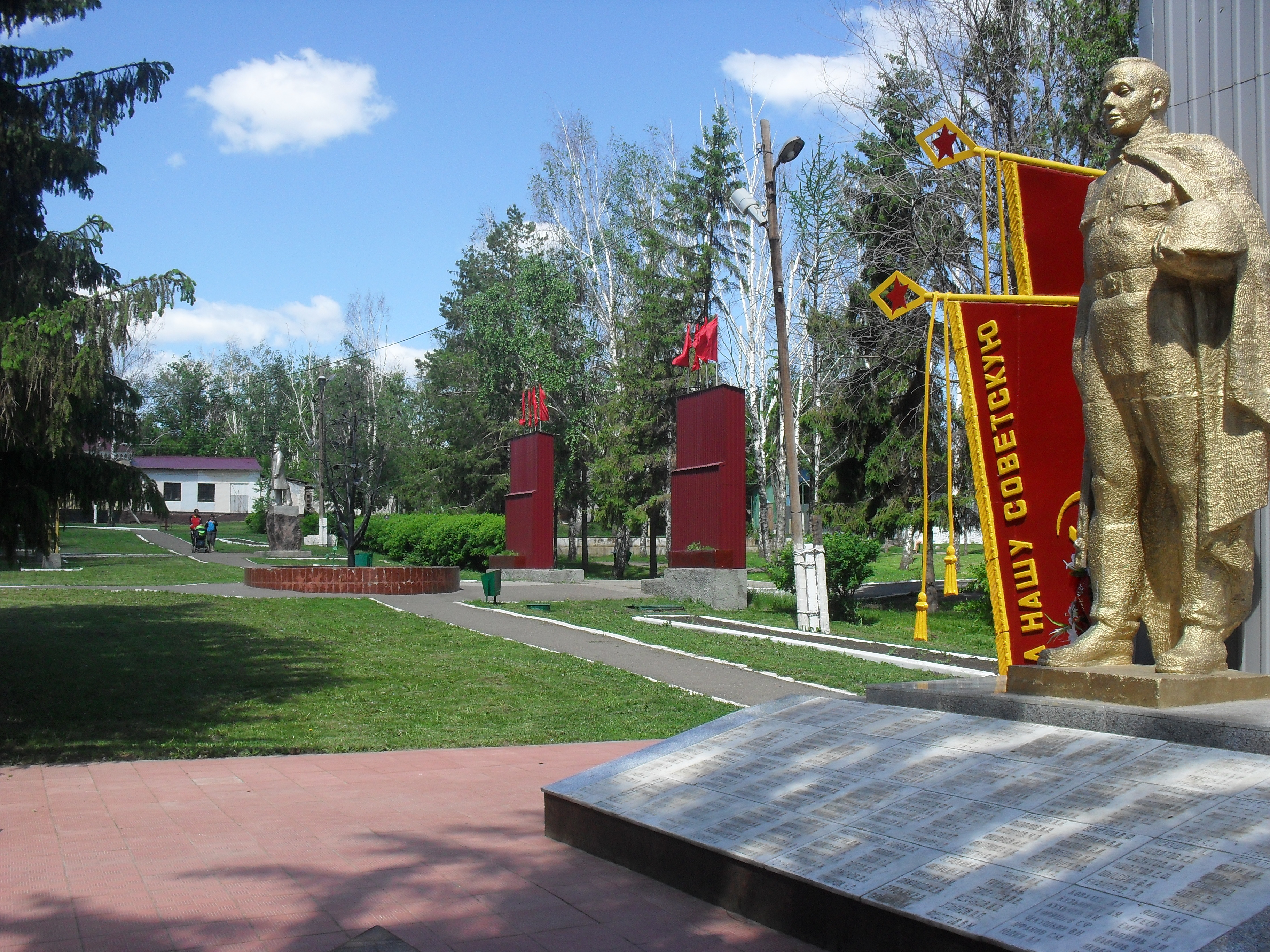 Парк в селе Кошки, Кошкинский район Самарской области, Россия